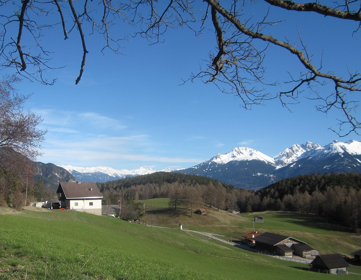 Zirler Berg von oberhalb Leithen, mit Pestsäule - Zirler Berg with Leithen and Pestsäule